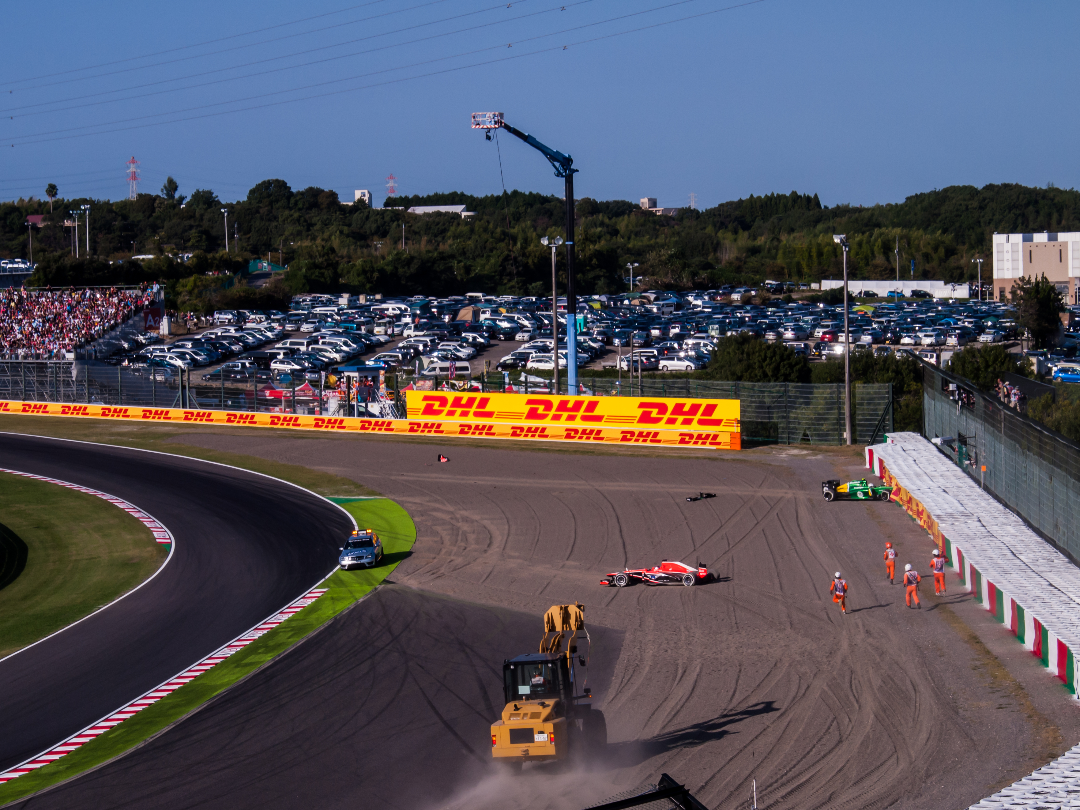 Accident de Jules Bianchi et de Giedo Van der Garde au premier tour du Grand Prix du Japon 2013